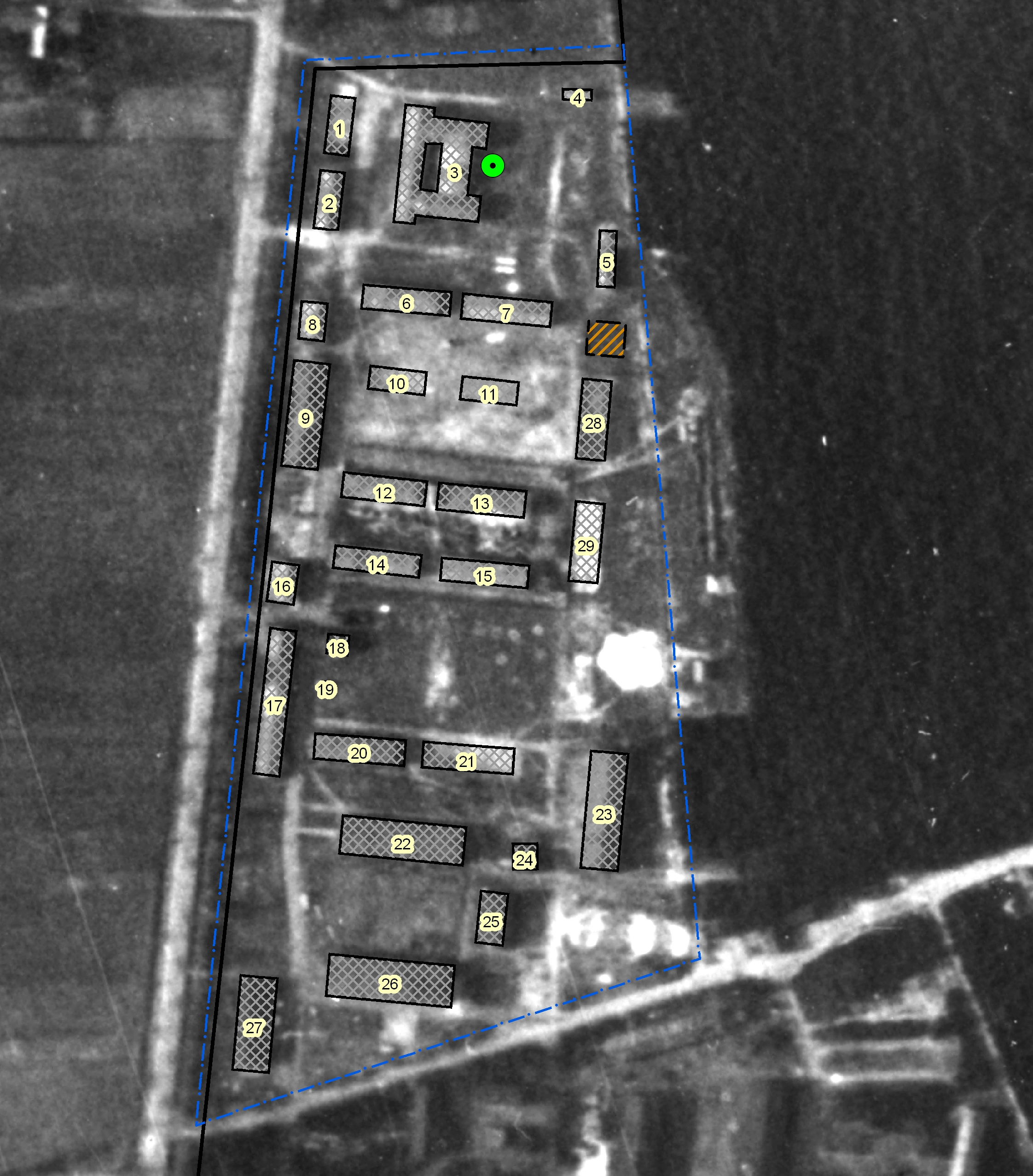 Alliiertes Luftbild von 1945 nmit Baulichkeiten des Stalag X A z Heidkaten (Kaltenkirchen)